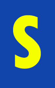 Letra S amarilla sobre fondo azul. Tipografía Tw Cen Consed Extra Bold.